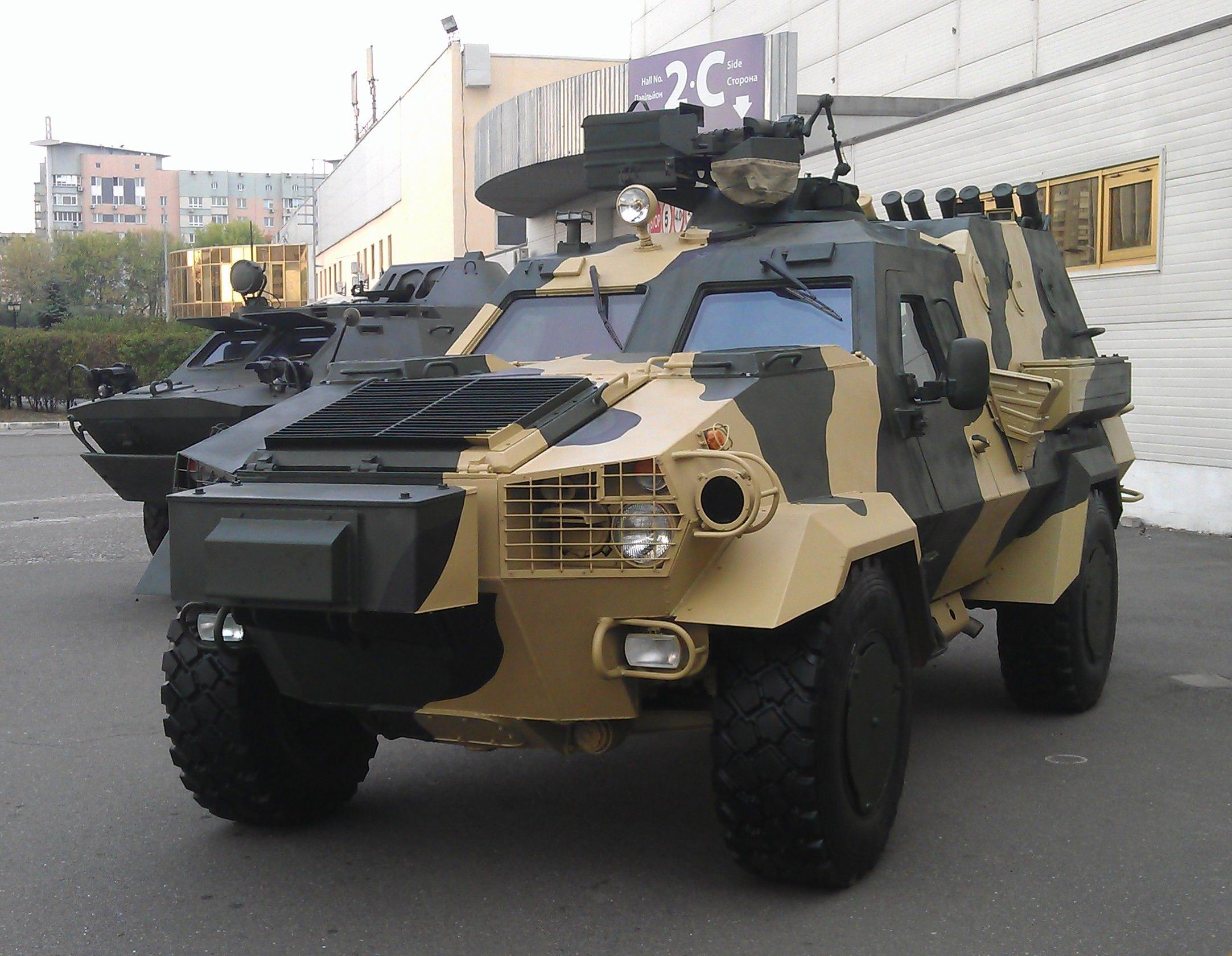 Бронетранспортер "Дозор-Б" в экспозиции Львовского бронетанкового завода. Выставка "Зброя та безпека", Киев, сентябрь 2015 г.